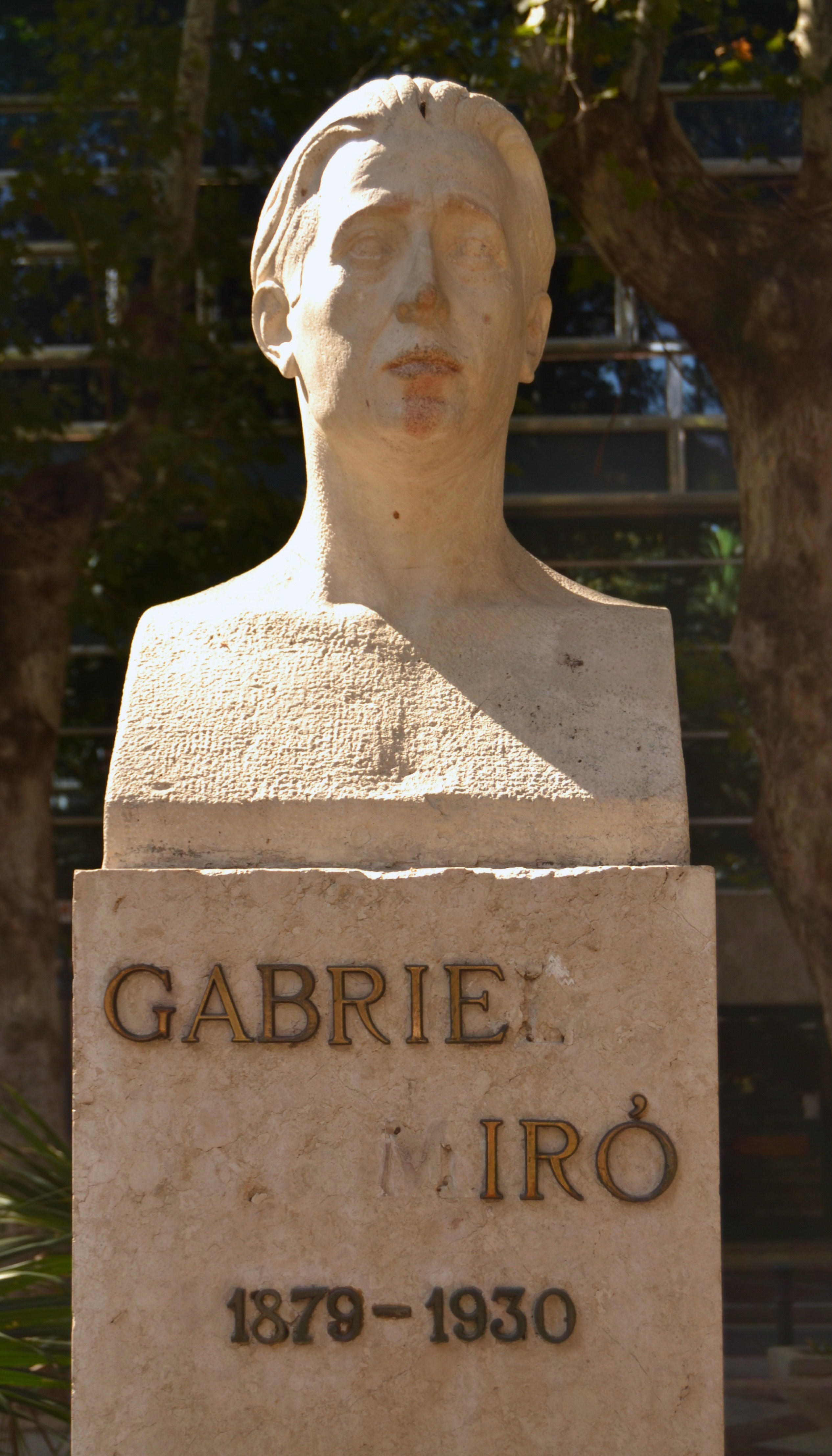 Monument a Gabriel Miró, Alacant. Escultura feta per José Samper Ruiz, fou inaugurada el 27 de maig de 1930 per commemorar el cinqué aniversari de la defunció de Miró.